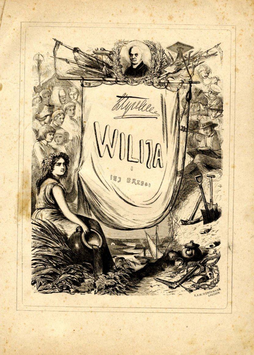 leidinio "Neris ir jo krantai" viršelis